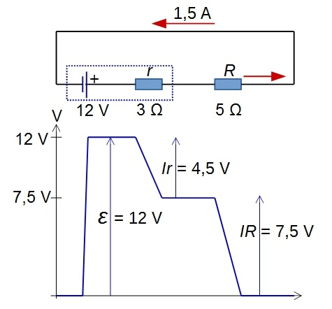 Electric circuit with voltage source at 12V. Ohmic resistor and internal resistance. Potential rise and fall around the loop.